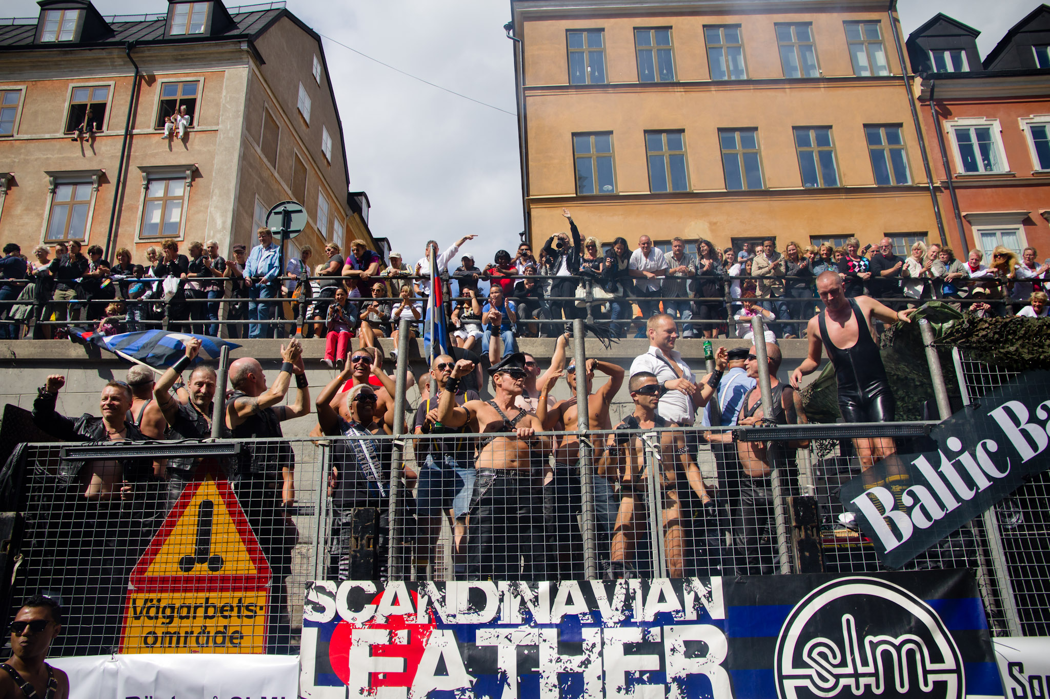 Представители SLM на параде в Стокгольме